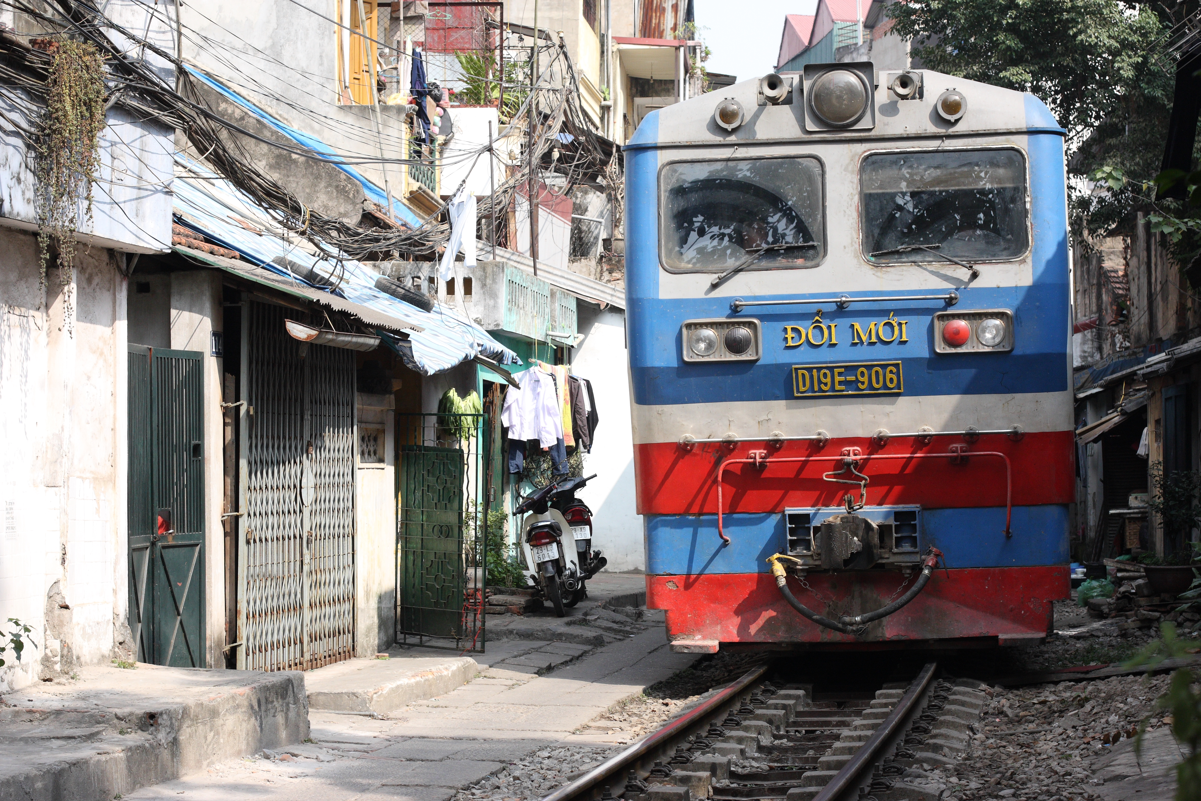 Old Quarter, Hanoi, Vietnam